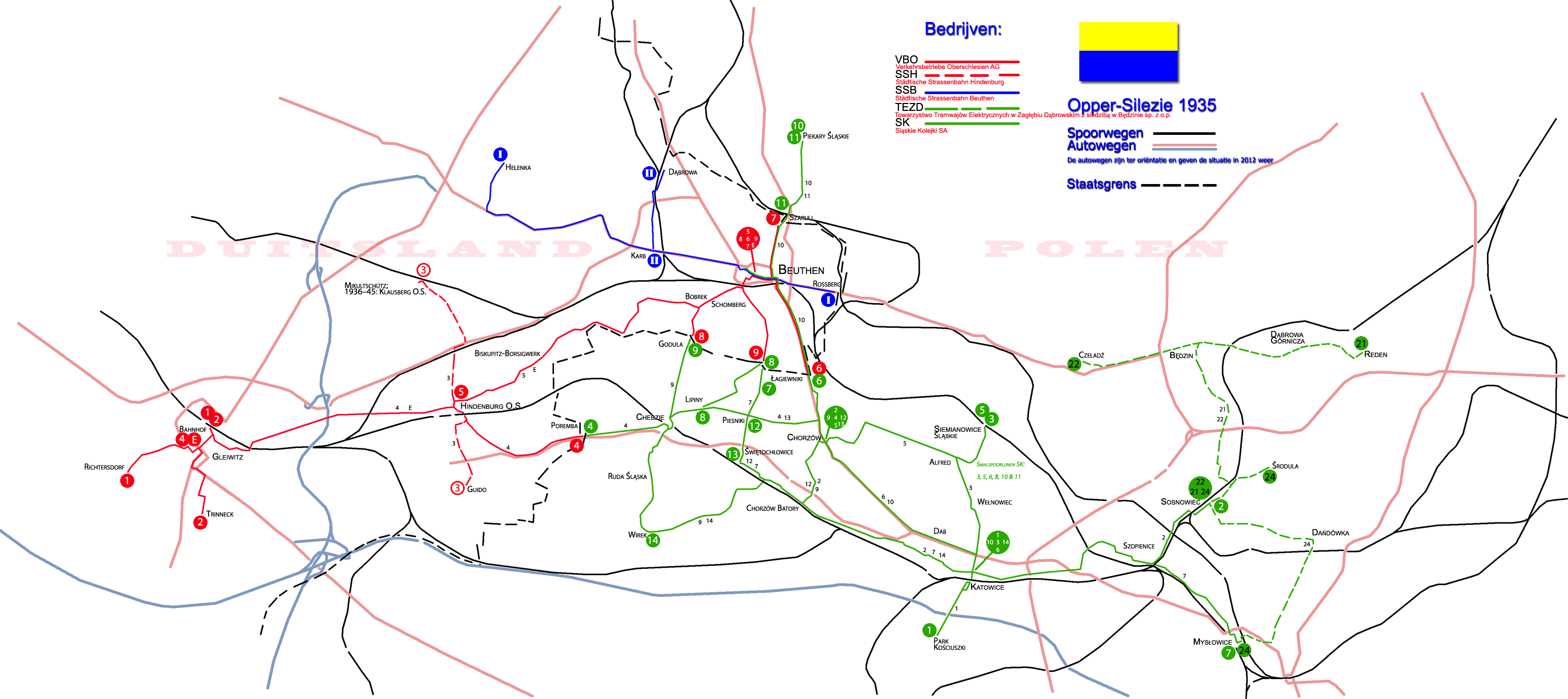 Tramnet Opper-Silezie 1935